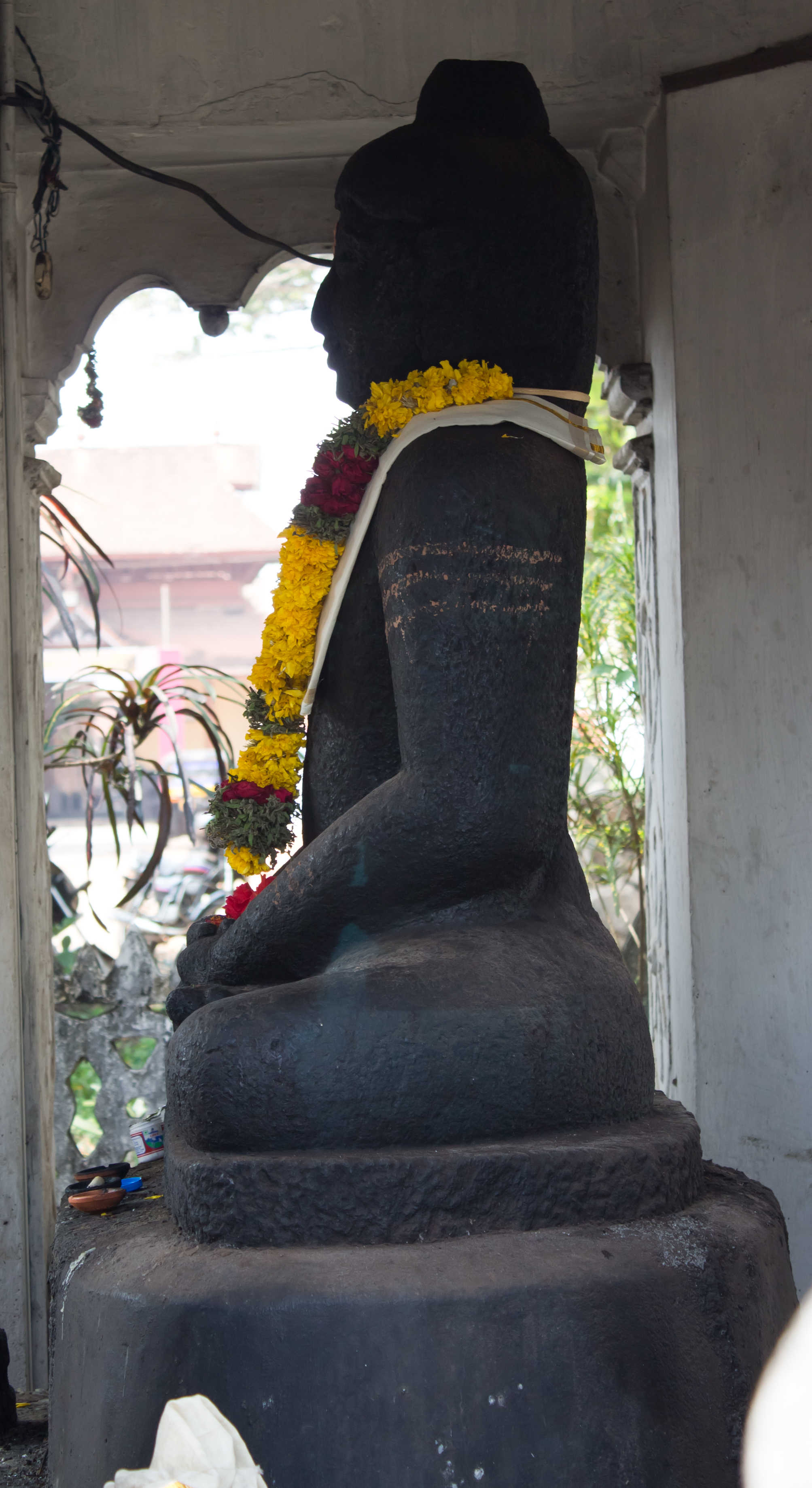 മാവേലിക്കരയിലെ ബുദ്ധപ്രതിമ